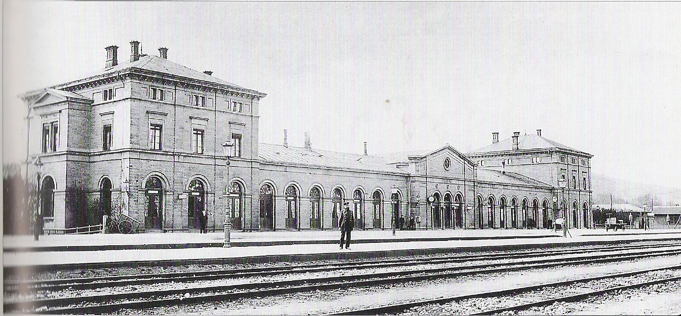 Bahnhof Lauda, Gleisseite des Empfangsgebäudes